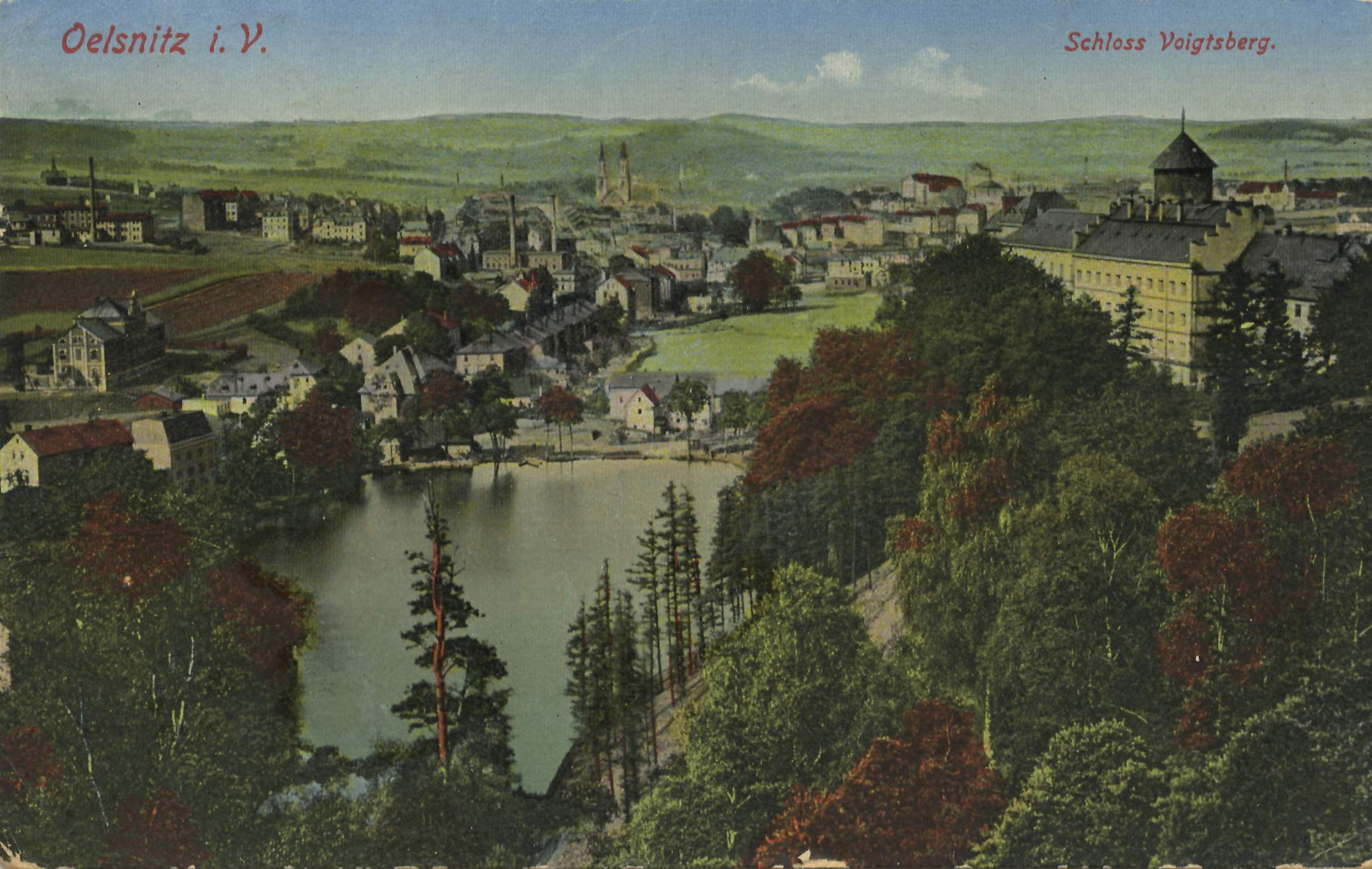 Schloss Voigtsberg